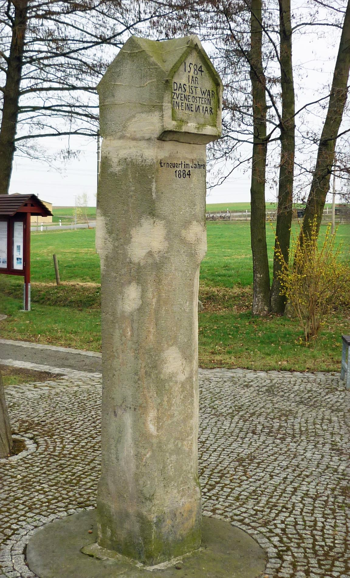 Bildstock in Lauterbach (Ostersäule)